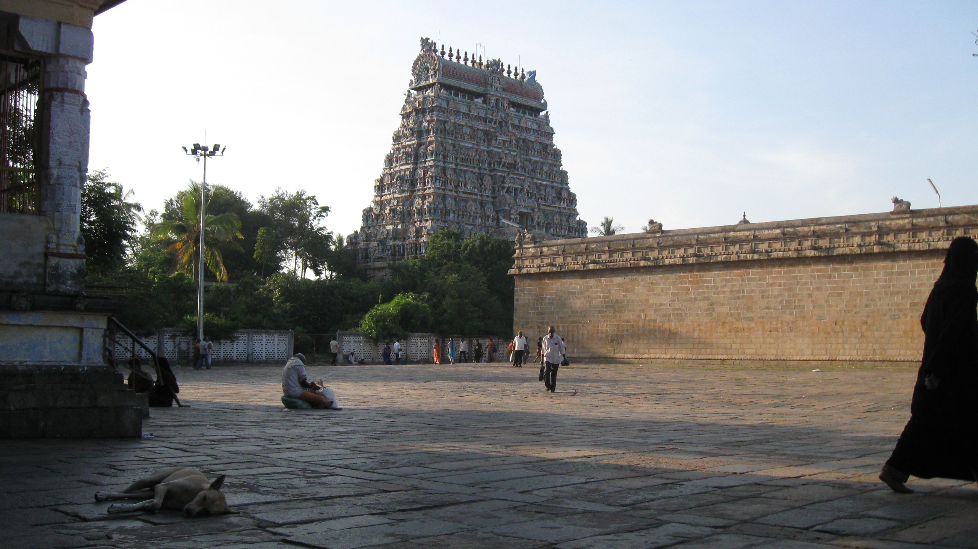 சிதம்பரம் கோயில் வாயிலின் ஒரு தோற்றம்